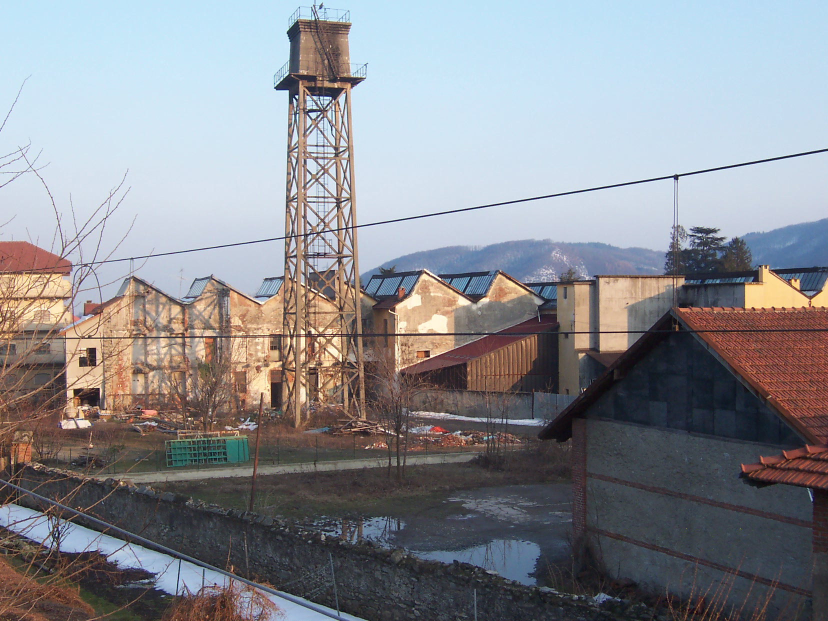 Establecimiento textil de Pralafera (Torre Pellice) Autor: Alfredobi